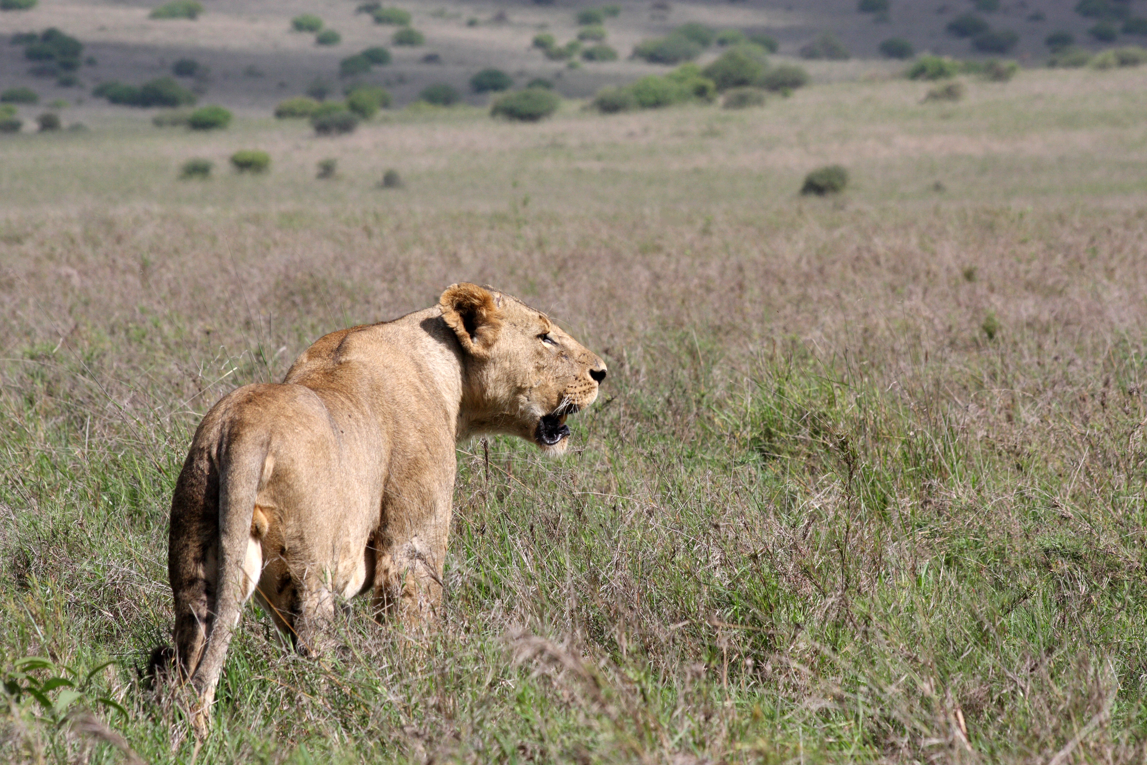 Nairobi National Park, Kenya